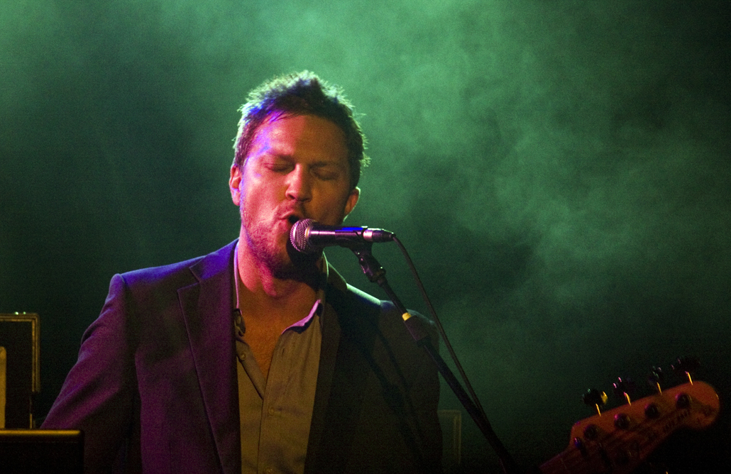 Fun Lovin' Criminals en la Sala Bikini, Barcelona, España. Fotos: Rosario López Podéis leer una crónica del concierto en